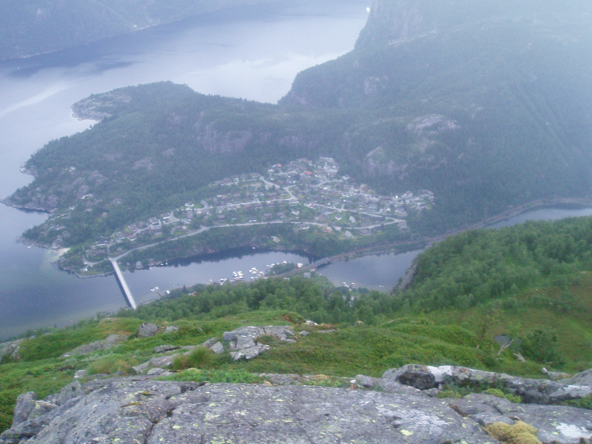 Bilde av Stanghelle Vest tatt frå Flatafjellet